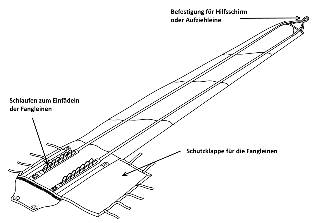 Verzögerungssack für russische Sprungfallschirme, genutzt unter anderem für PD-47.